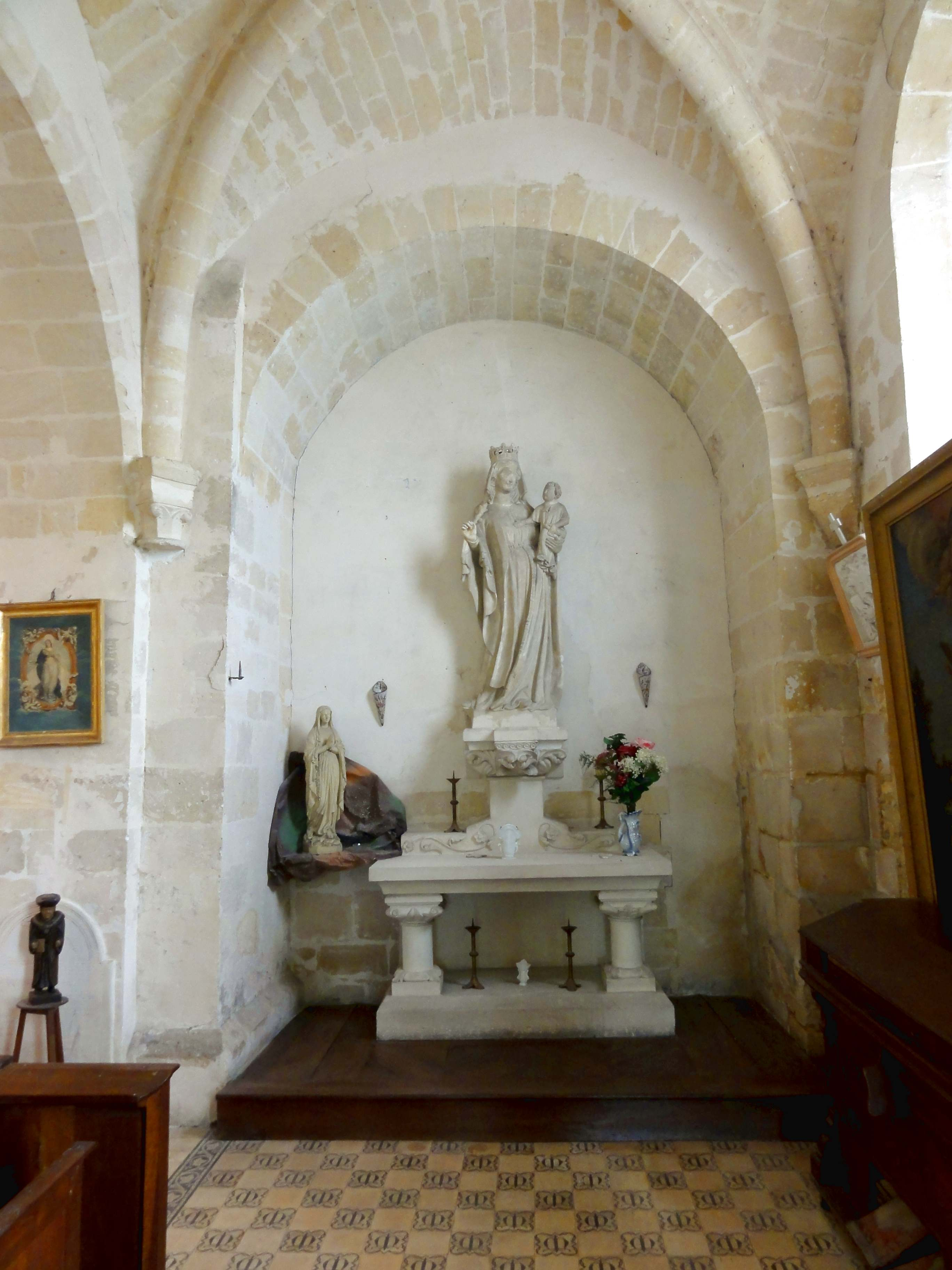 Intérieur de l'église - voir titre.